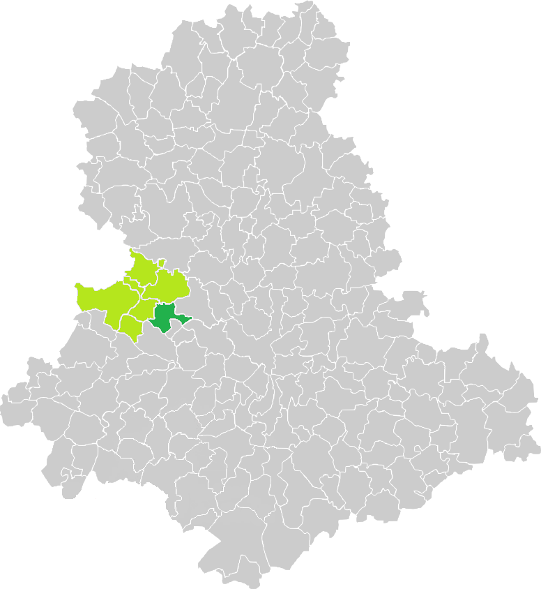 Carte de situation de la commune de Saint-Victurnien (en vert foncé) dans le votre Canton (en vert clair) sur une carte des communes de la Haute-Vienne